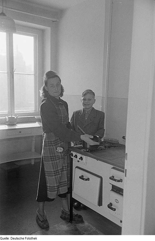 Original image description from the Deutsche Fotothek Frau Schöbel mit ihrem Sohn am Herd in einer neuen Wohnung auf der Straße der III. Weltfestspiele